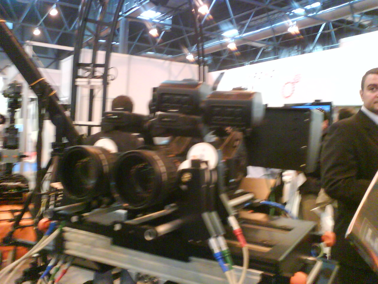 Cámara de TV en 3D con las cámara individuales dispuestas en horizontal, vista de frente.